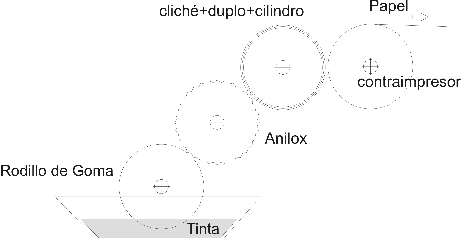 Esquema de una impresora flexográfica. El Rodillo de goma toma la tinta y la entrega al anilox. Al estar apretado solo se traspasa tinta que esta en los alveolos, generando una película homogénea que pasa al cliché y luego al sustrato (papel, plástico, cartón). - La principal función del rodillo de goma es eliminar los defectos de desalineación o errores en la curvatura del anilox. - Algunas maquinas impresoras usan una cuchilla o Doctor Blade para eliminar el exceso de tinta. - El Duplo es un material blando con adhesivo en ambas caras que permiten pegar el cliché al cilindro y disminuir los defectos debidos a la variación de espesor en el sustrato que se va a imprimir.